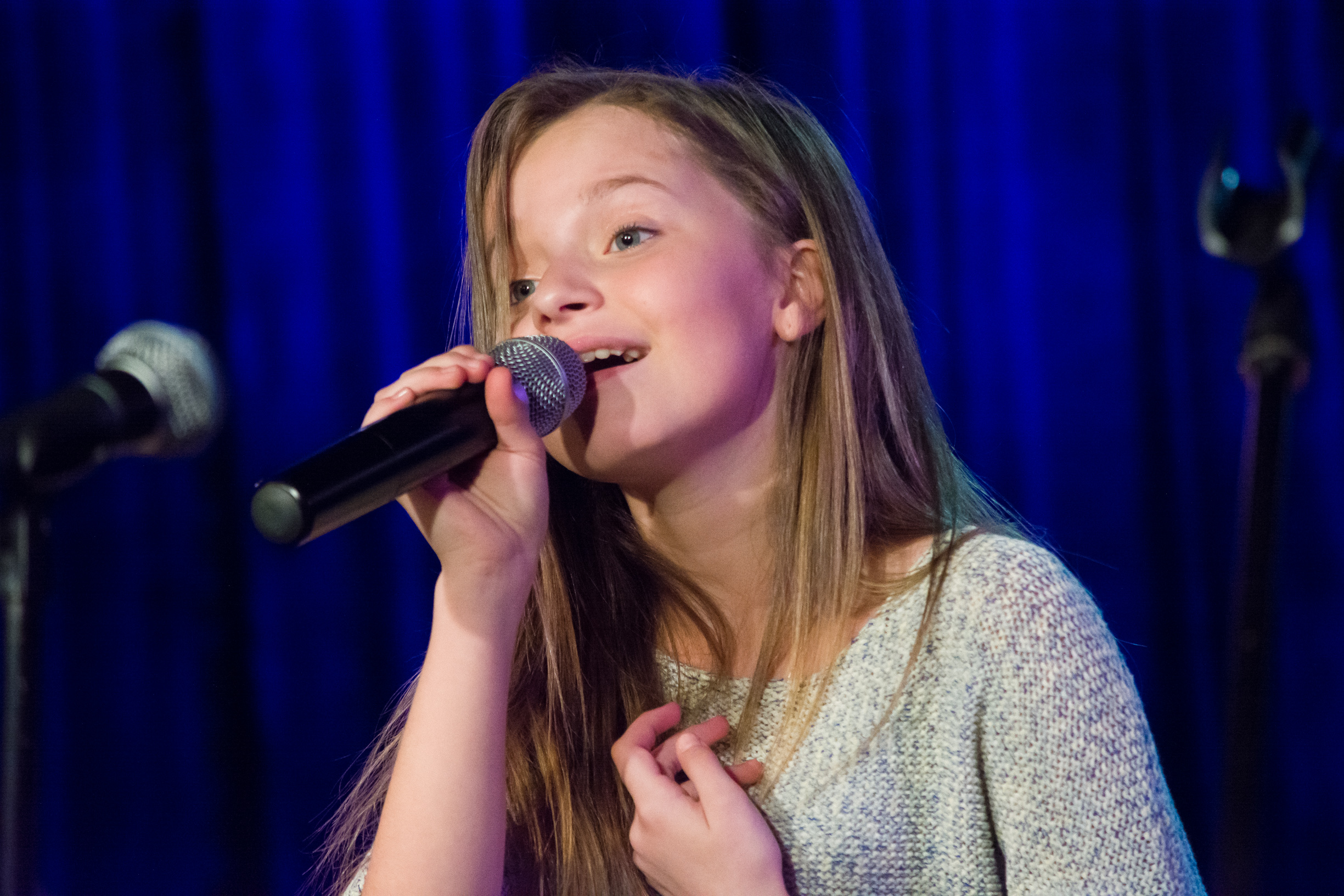 Алиса Кожикина на концерте «Забавный апрель» в клубе Алексея Козлова